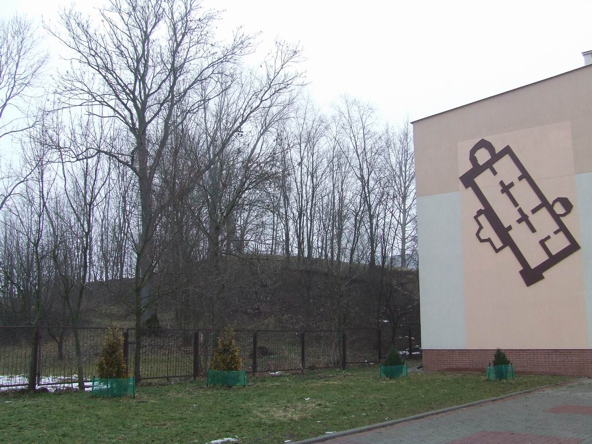 Sidra, wzgórze zamkowe przy szkole - na ścianie plan zamku, na wzgórzu czytelne fundamenty